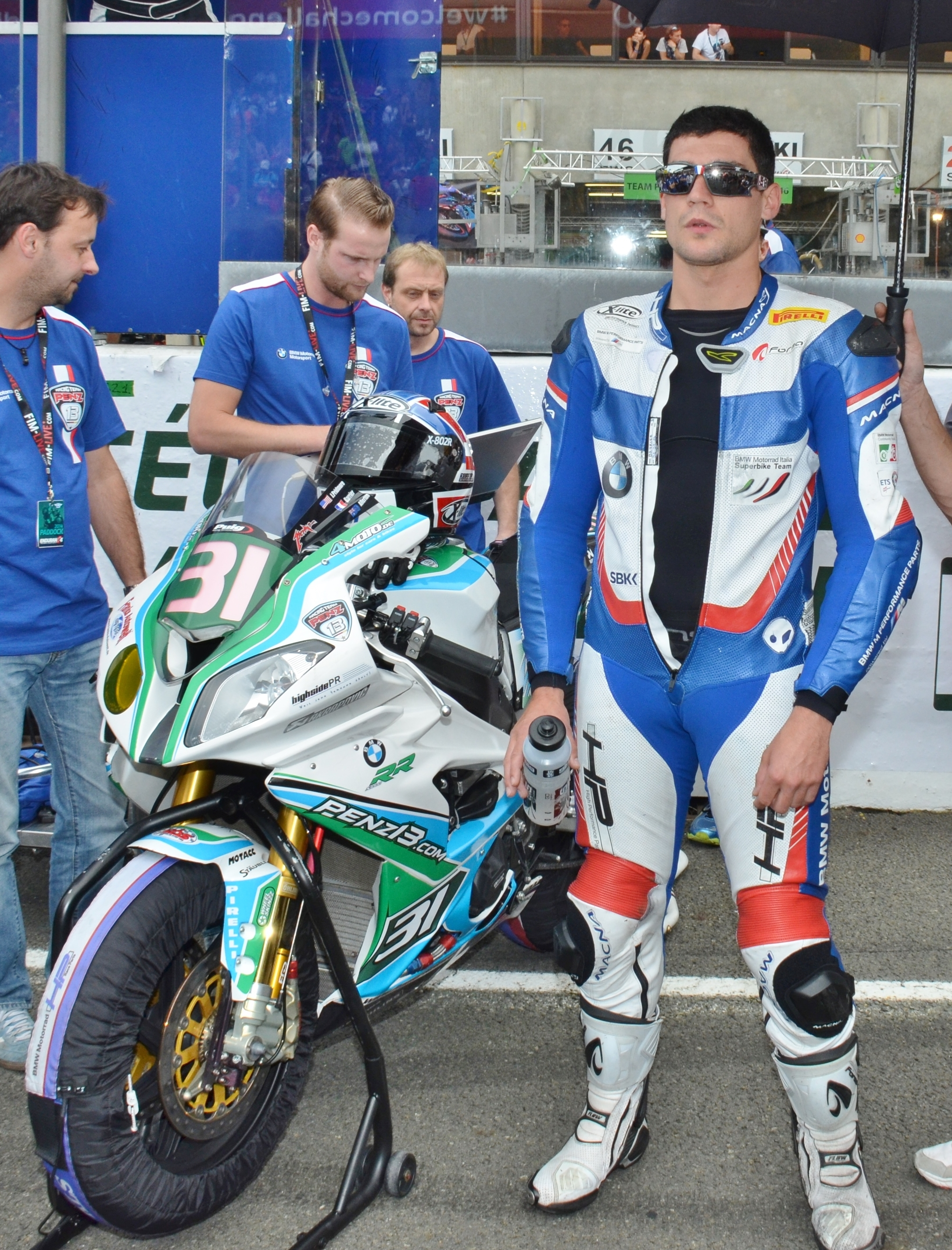 Sylvain Barrier au départ des 24 Heures Moto 2014